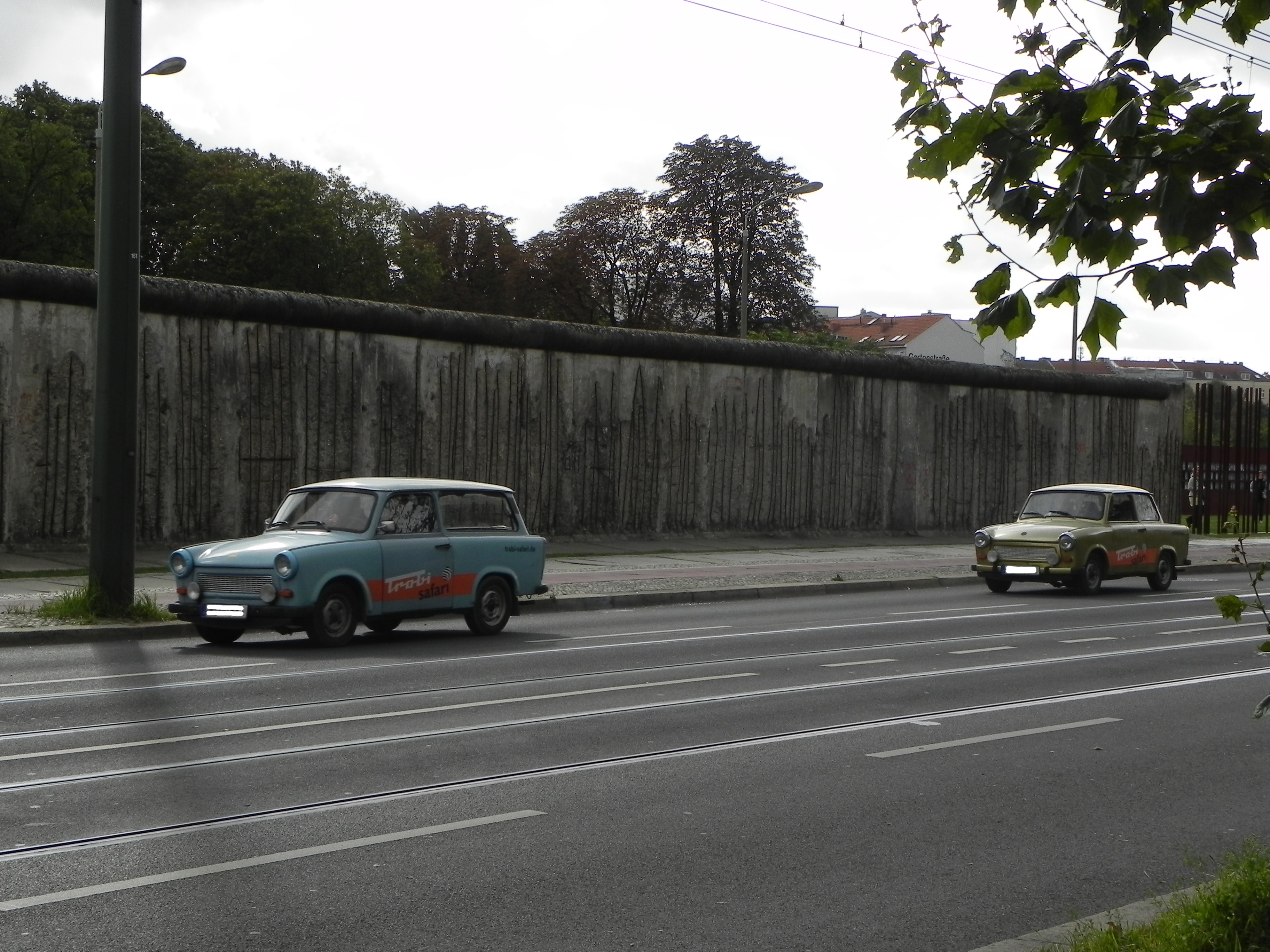 Erhaltene Grenzmauer an der Bernauer Straße